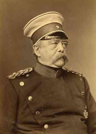 Portret Otto von Bismarck z 1877. Height: 17.3 cm (6.8 in); Width: 11.4 cm (4.4 in) dimensions QS:P2048,17.3U174728;P2049,11.4U174728